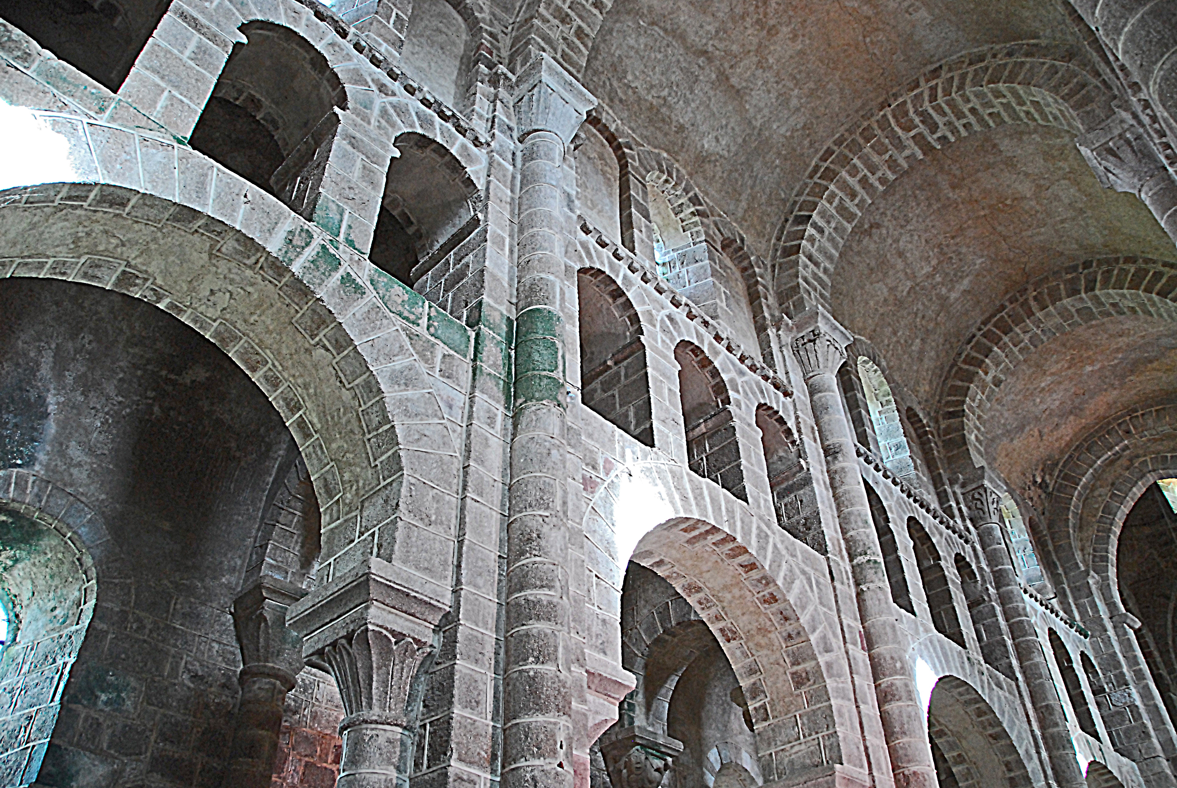 N.-D. de Châtel-Montagne, Mittelschiff, Nordwand u. Gewölbe